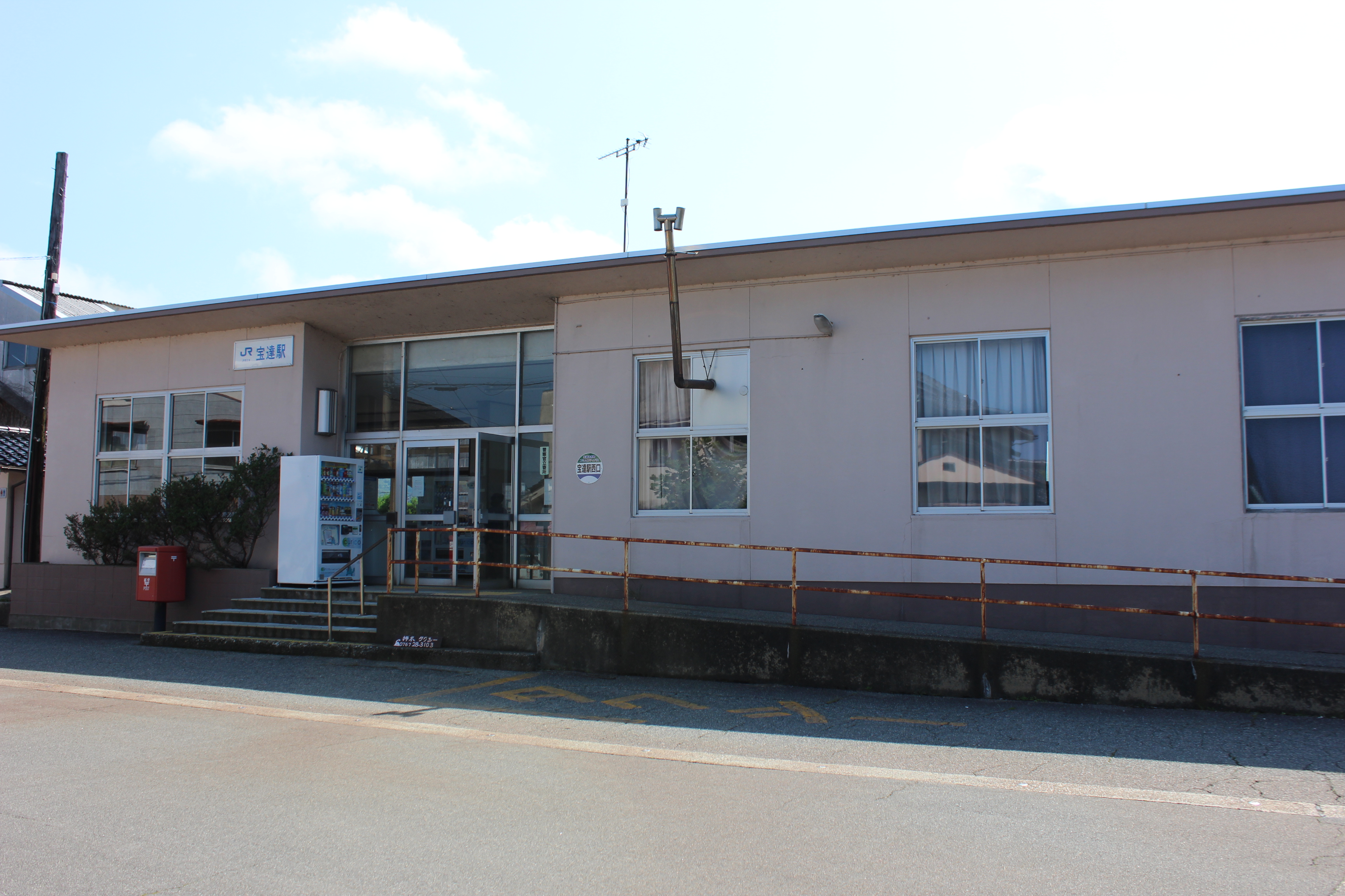 宝達駅西口 Canon EOS Kiss X5